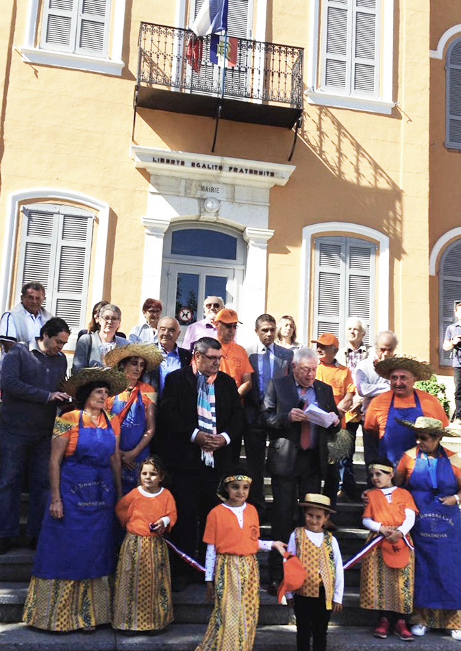 Inauguration de la foire a l'oignon de Montmeyan le 17 septembre 2017